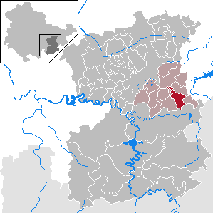 Löhma in Thuringia - Saale-Orla-Kreis